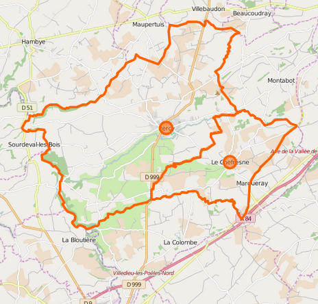 Carte de la commune nouvelle et de ses communes déléguées